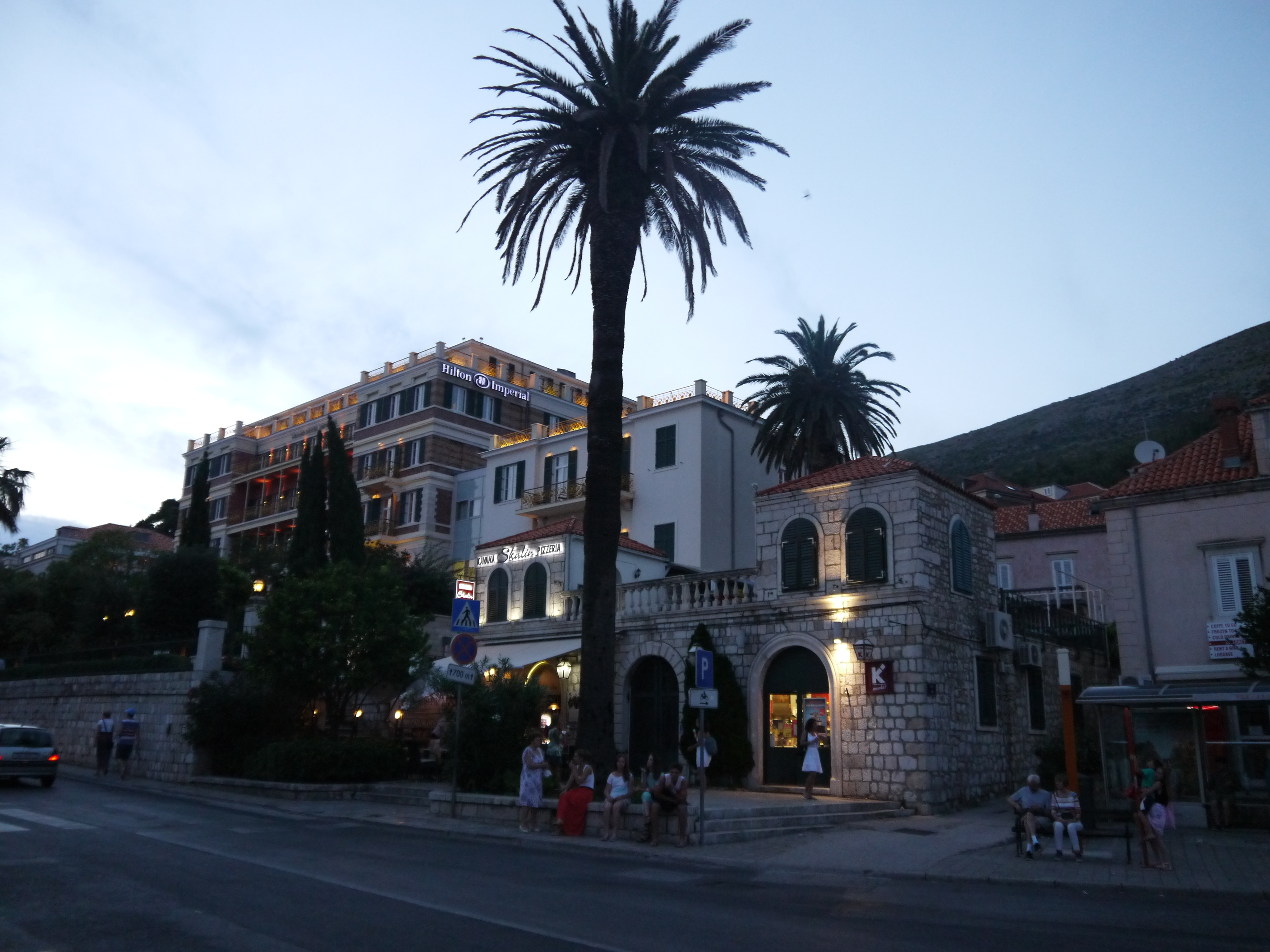 Dubrownik Hotel Hilton